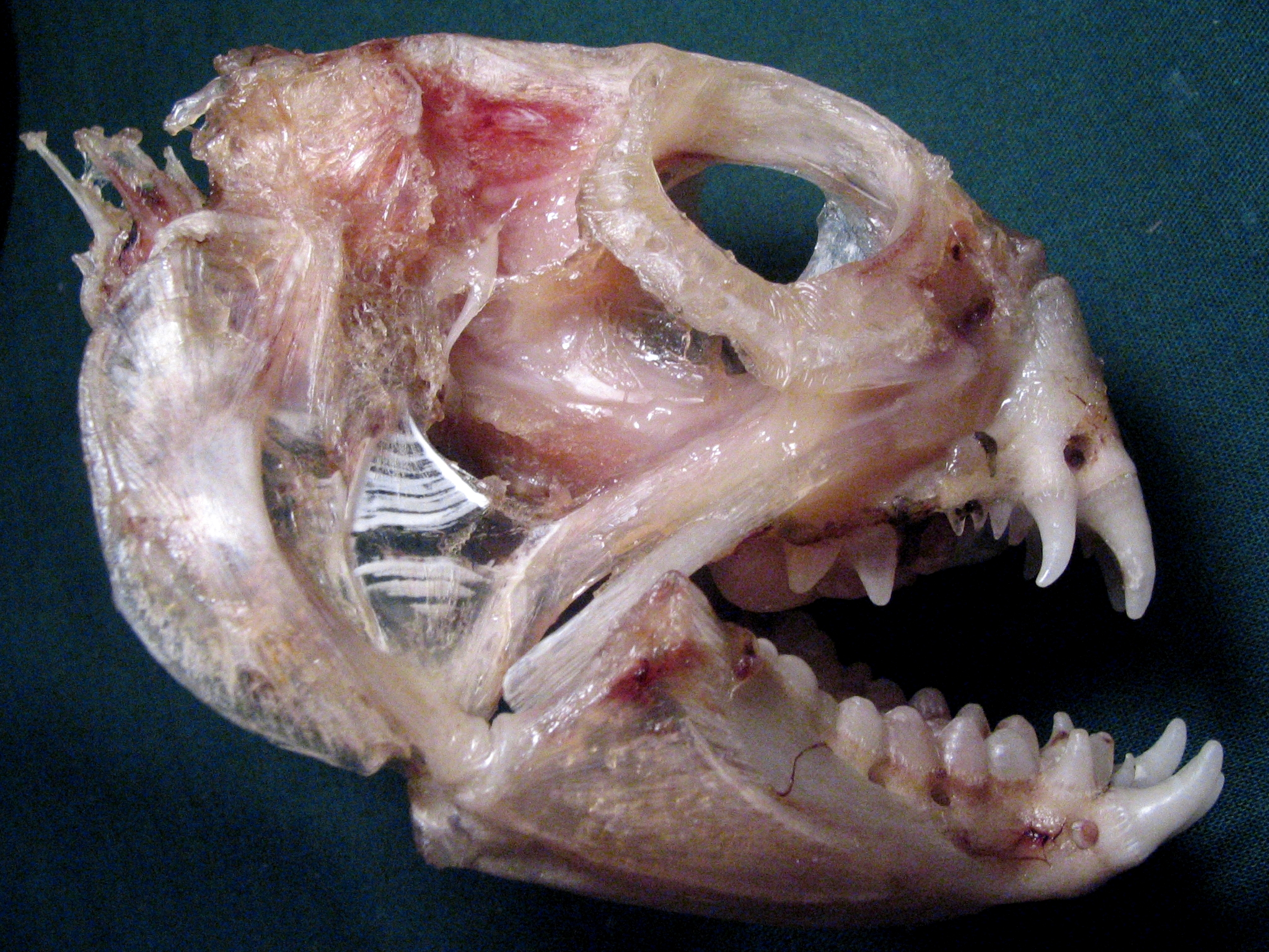 squelette de tête de loup de l'Atlantique.